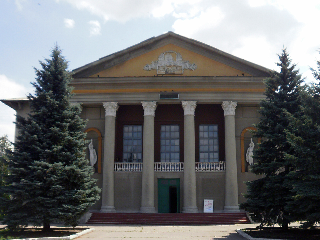 пгт Мироновский Донецкой области